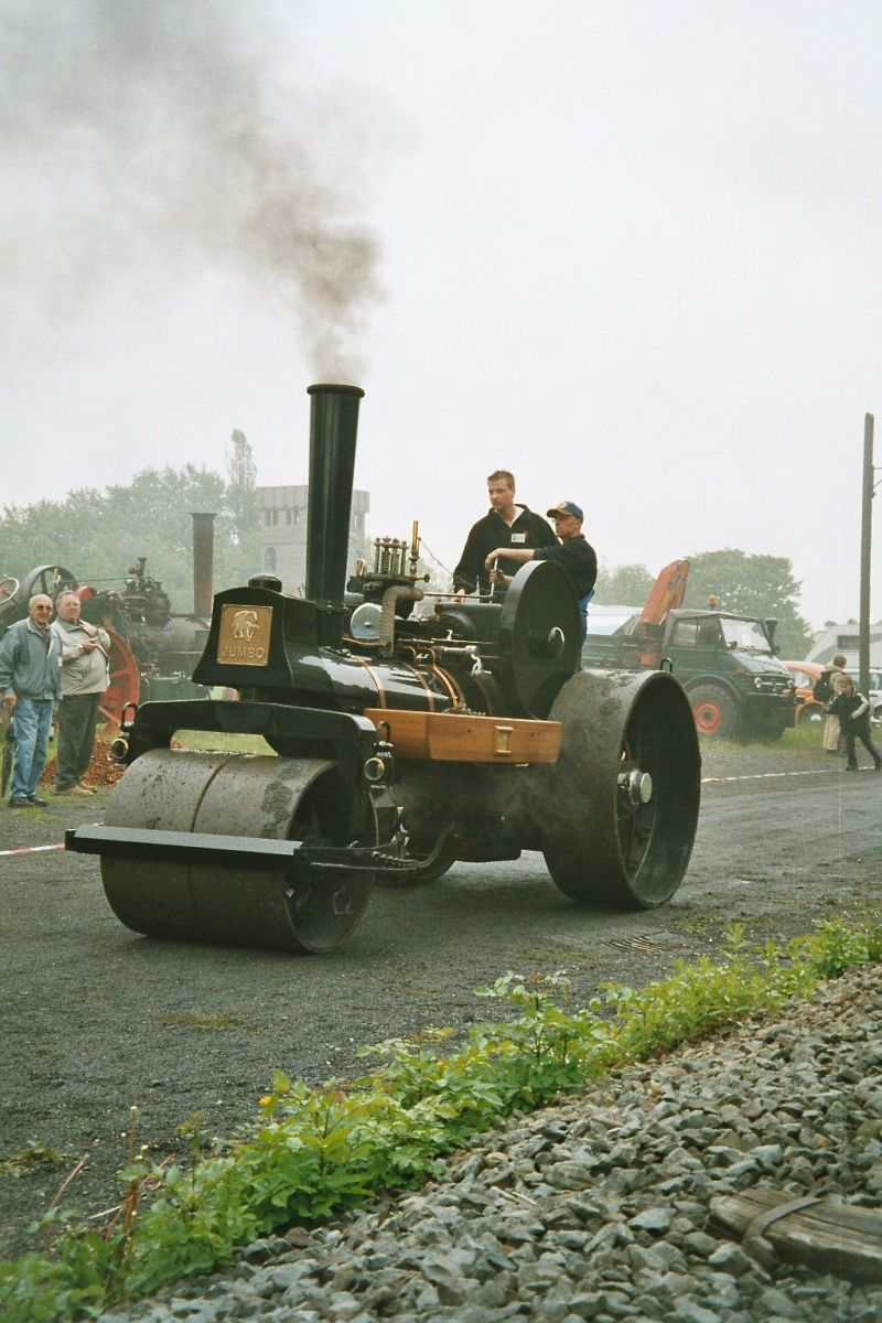 Zeche Hannover, Dampfmobiltreffen 2004